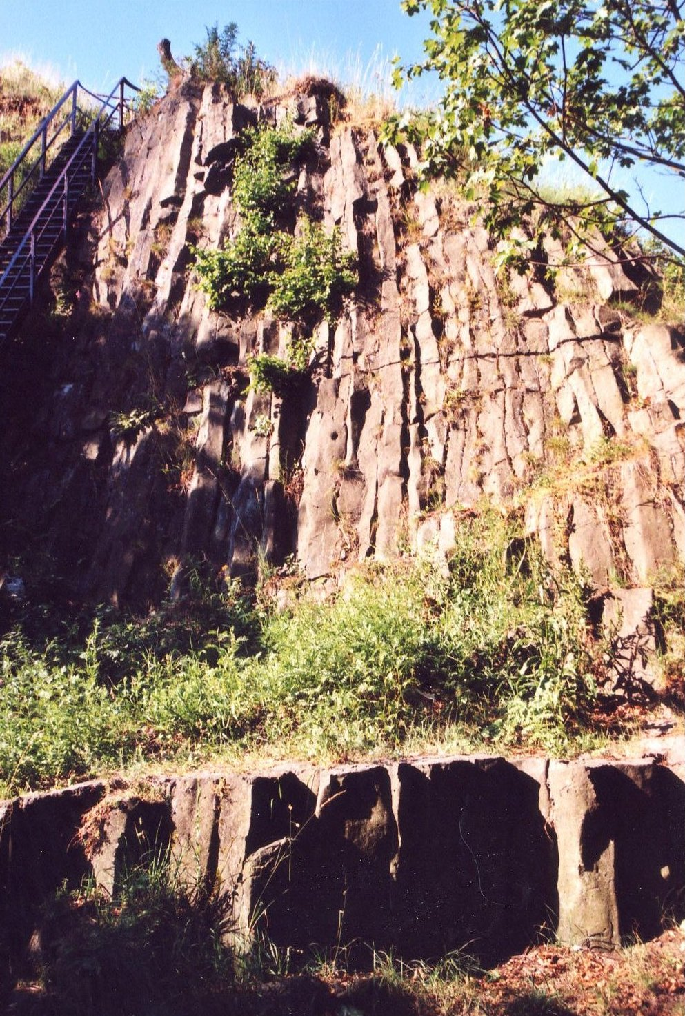 Cottaer Spitzberg: Basaltsäulen am Gipfel